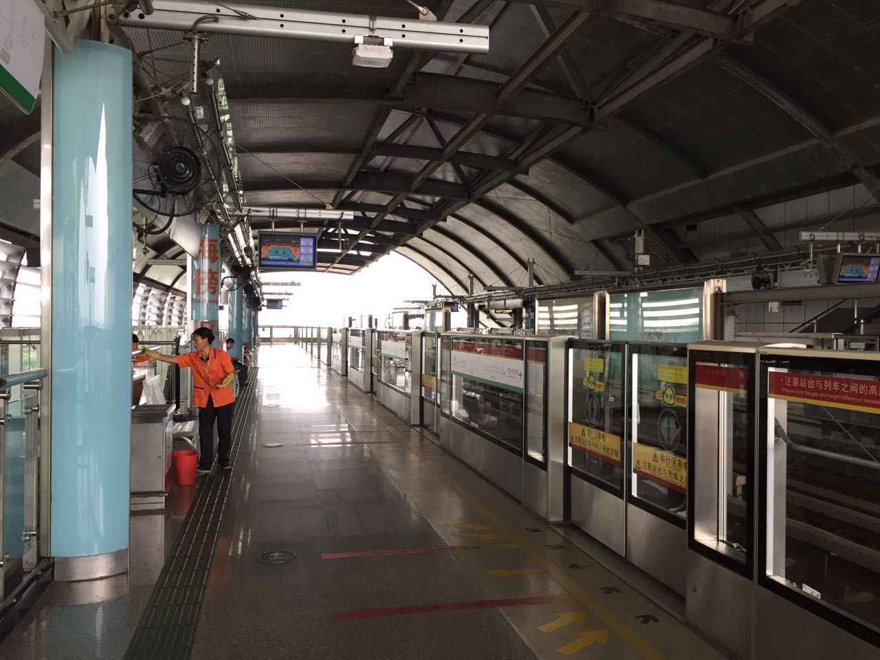 广州地铁海傍站